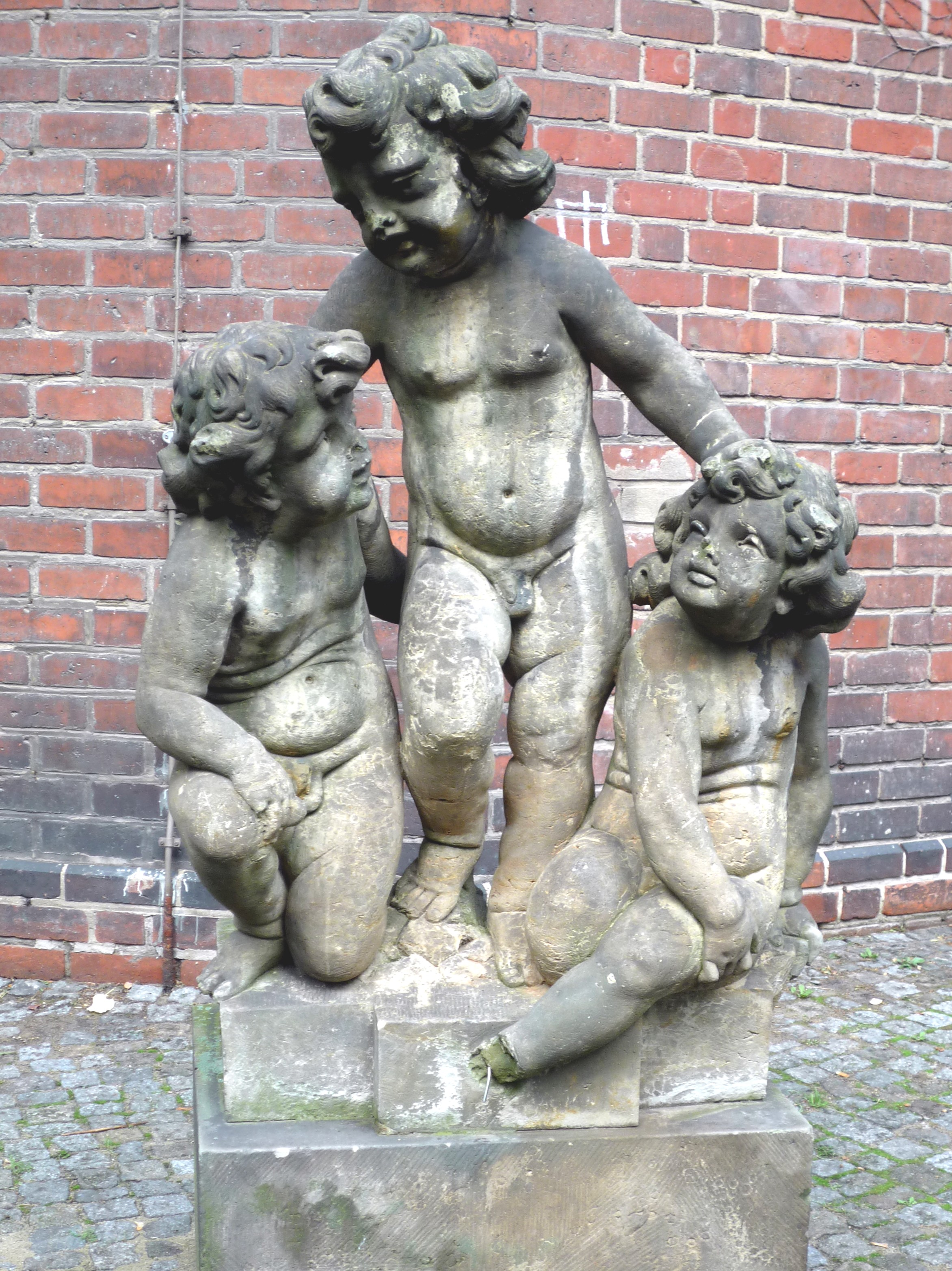 Lapidarium (Sammlung von Bildwerken aus Stein) im Köllnischen Park im Berliner Stadtbezirk Mitte. Gruppe von drei Putten, Sandstein, moderne Kopie nach einer Plastik von der Balustrade des Neuen Palais in Potsdam.